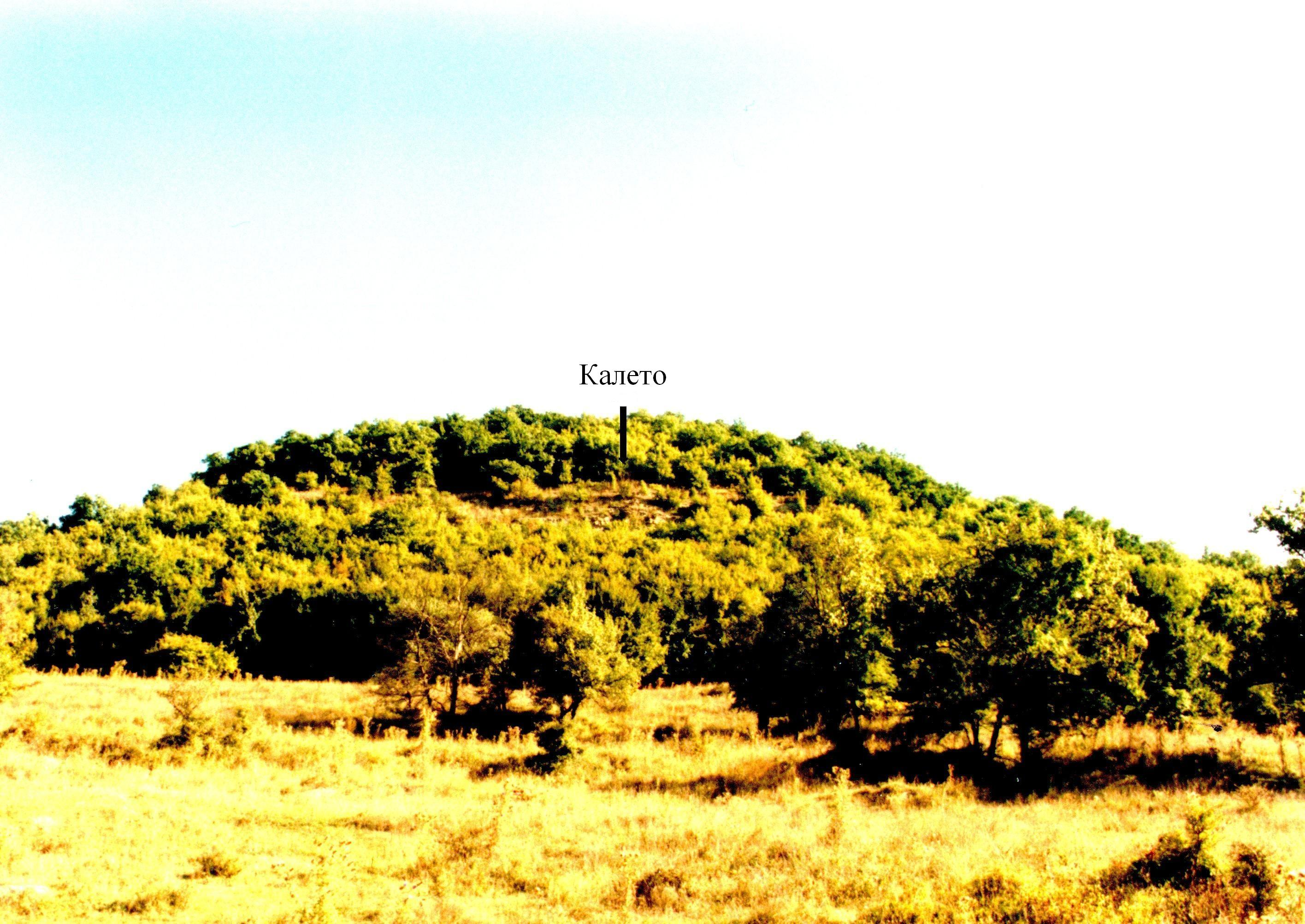 Хълмът от Преславската планина, на който е построена крепостта при днешното село Долна Кабда, Поповско